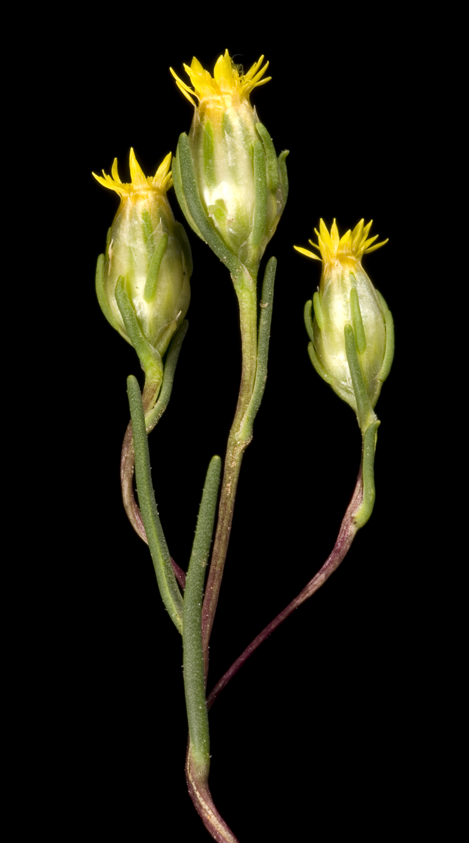 KRT3386